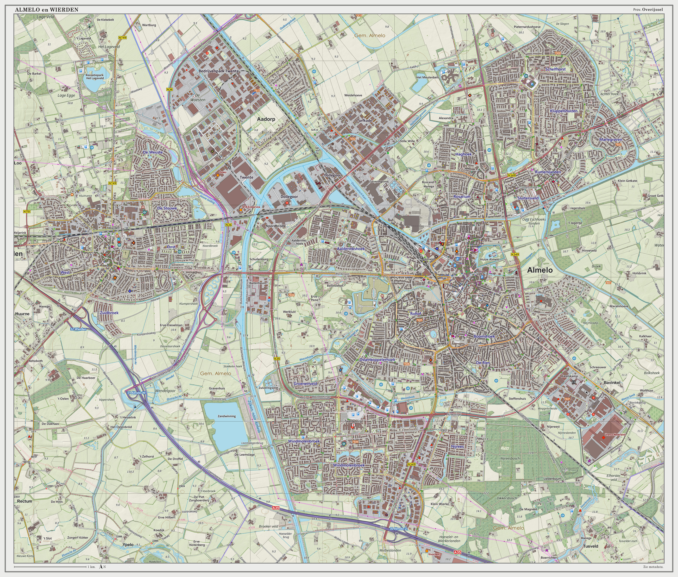 Topografische kaart van Almelo (woonplaats). Resolutie: 300 pixels/km. Kaartbeeld samengesteld uit de open geodata van de Top10NL en Top25namen (Basisregistratie Topografie, Kadaster), Creative Commons BY licentie. Gebouwvlakken uit open geodata BAG extract. Wegen uit de OpenStreetMap. Schaduwreliëf uit de Actuele Hoogtekaart AHN2. Samenstelling en kleurenschema: Jan-Willem van Aalst, met QGIS2. Zie ook de Legenda.